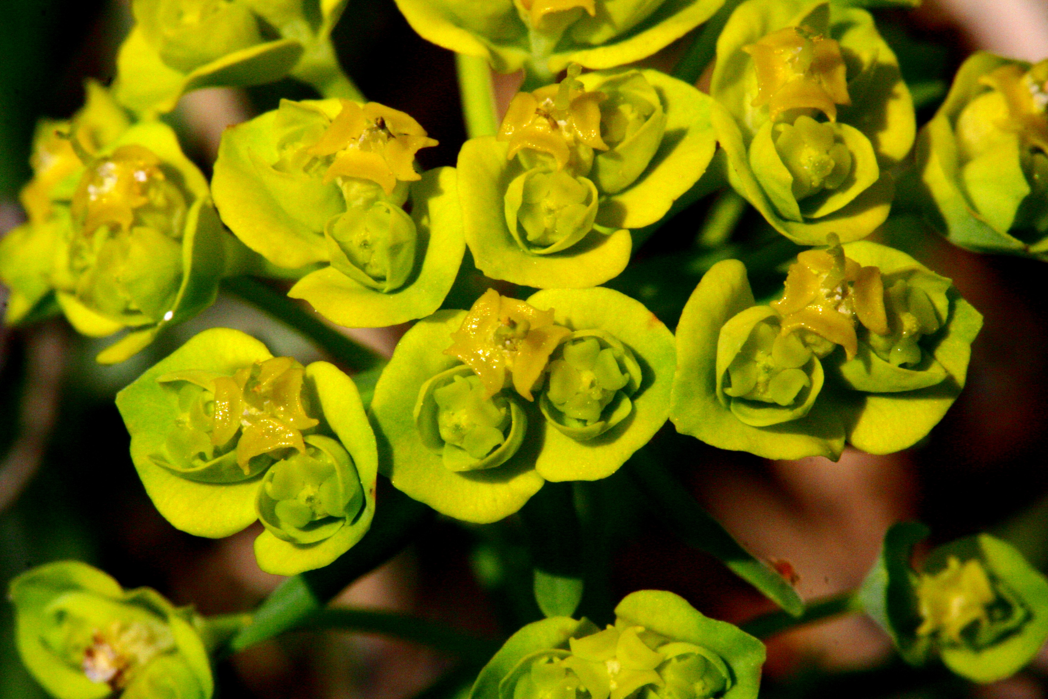 Euphorbia_cyparissias (Euforbia cipressina) Località : Visome (BL), 350 m s.l.m.